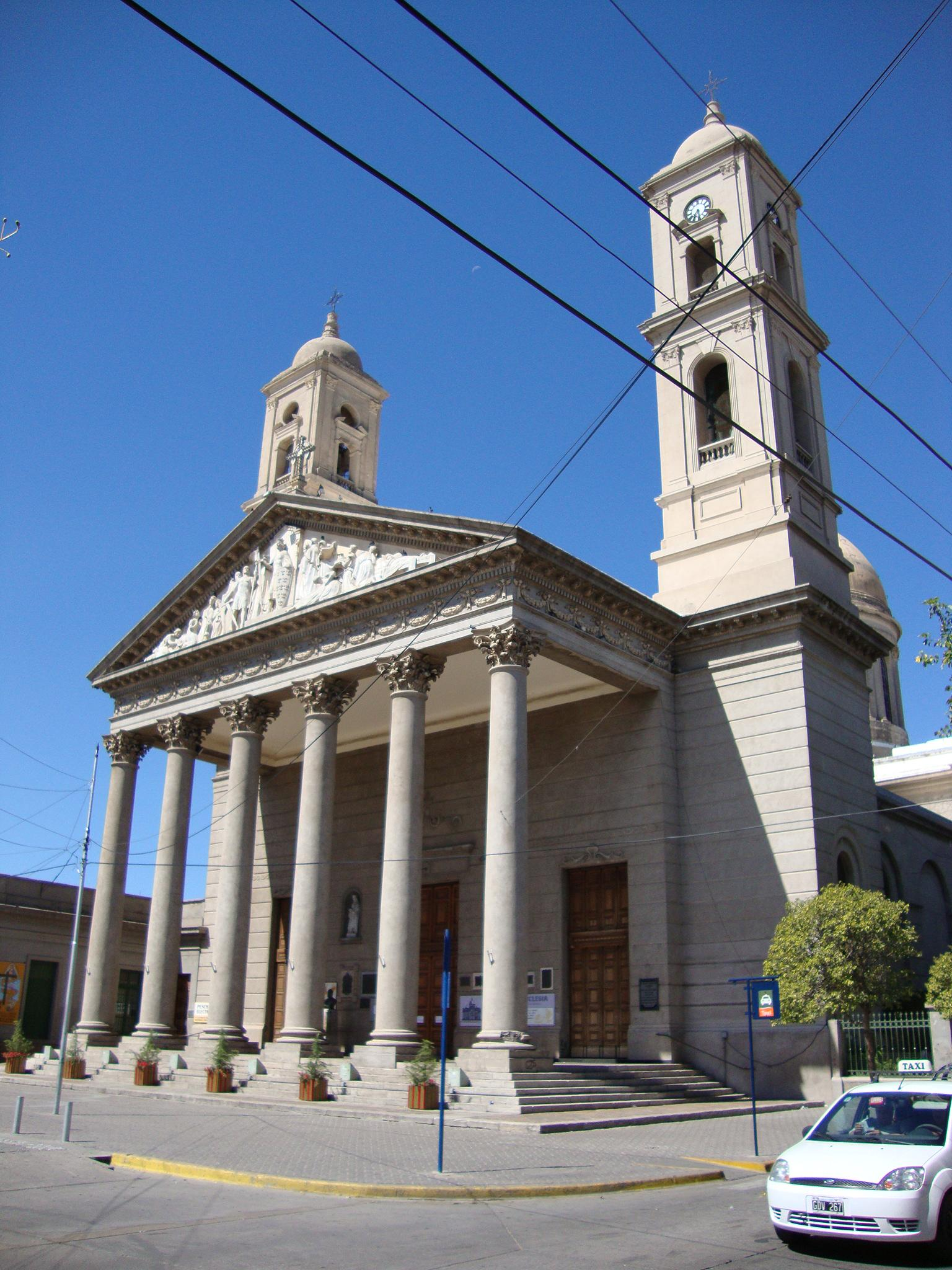 Catedral de la Inmaculada Concepción, ciudad de San Luis (Argentina). Frente a la Plaza Pringles, en la esquina de las calles Pringles y Rivadavia.